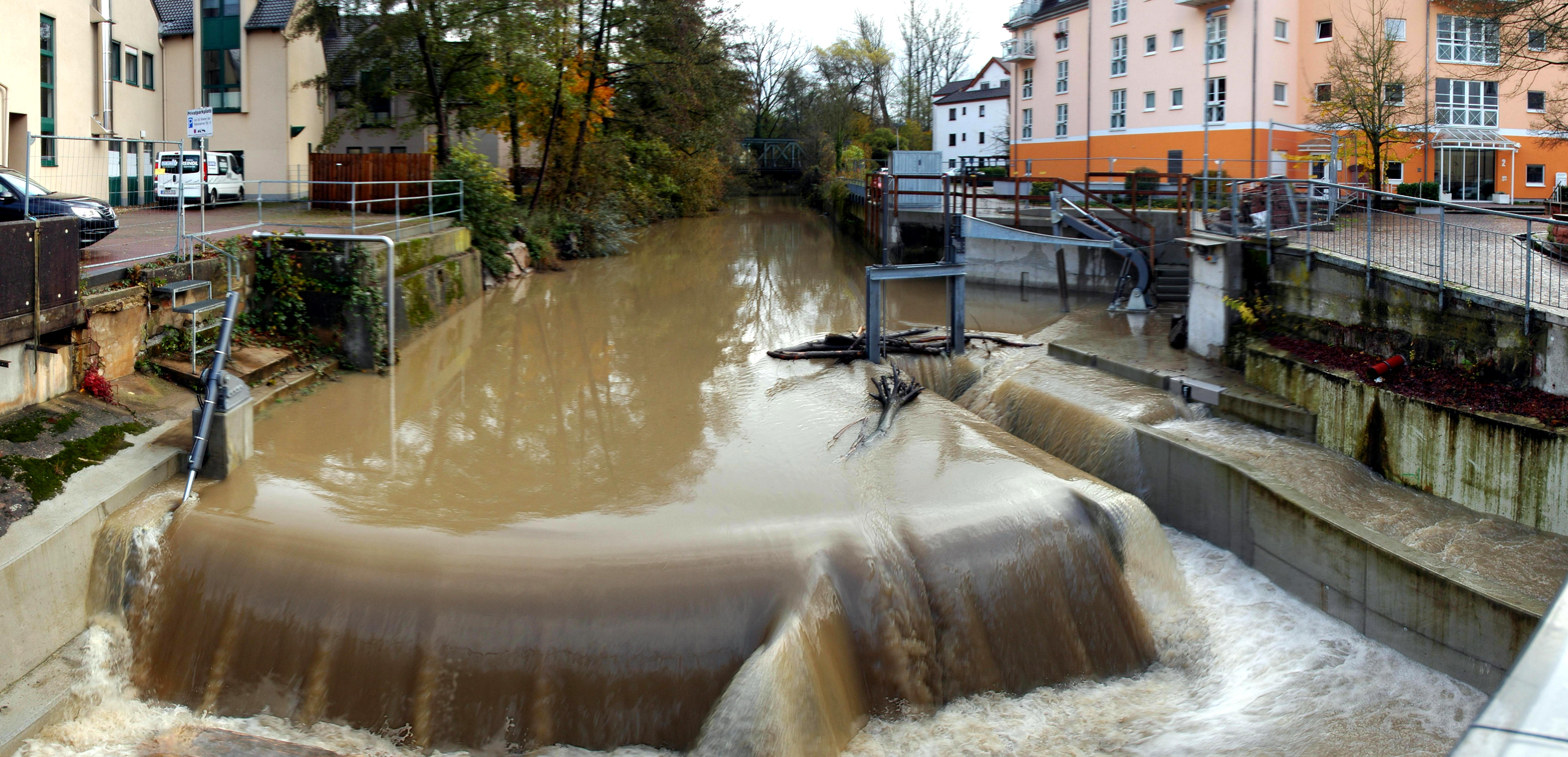 Bammental - Wehr bei Tapetenfabrik am 30 November 2017.